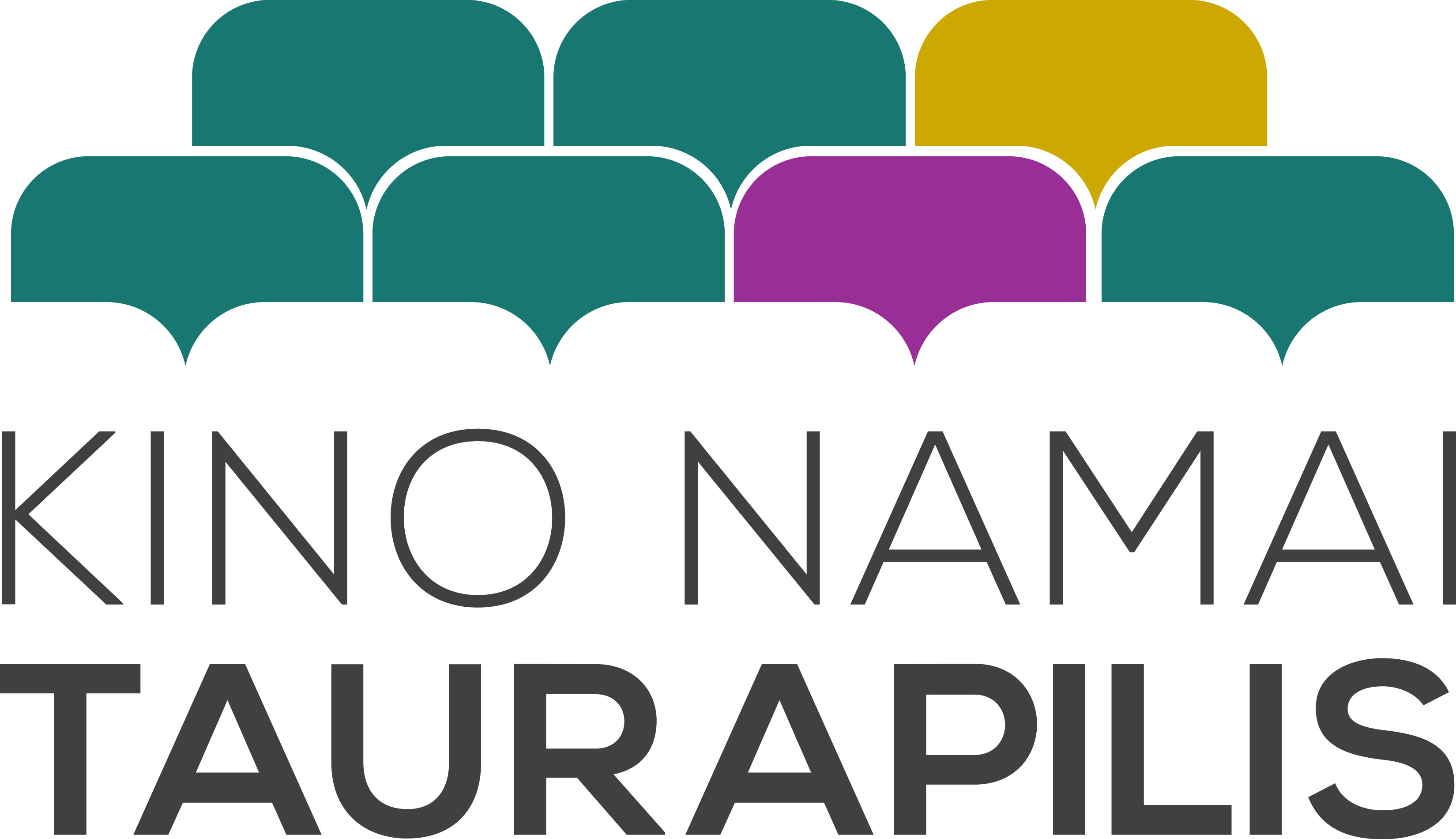 Kino namai TAURAPILIS. 2015, Utena